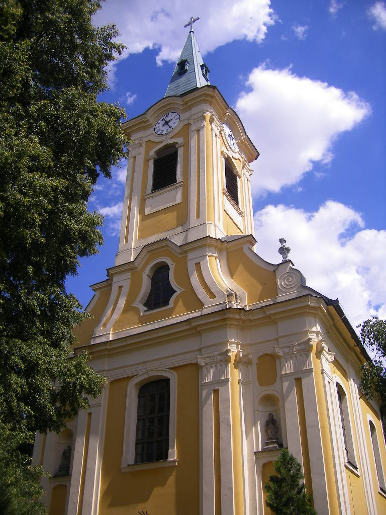 Vámosmikola - katolikus templom